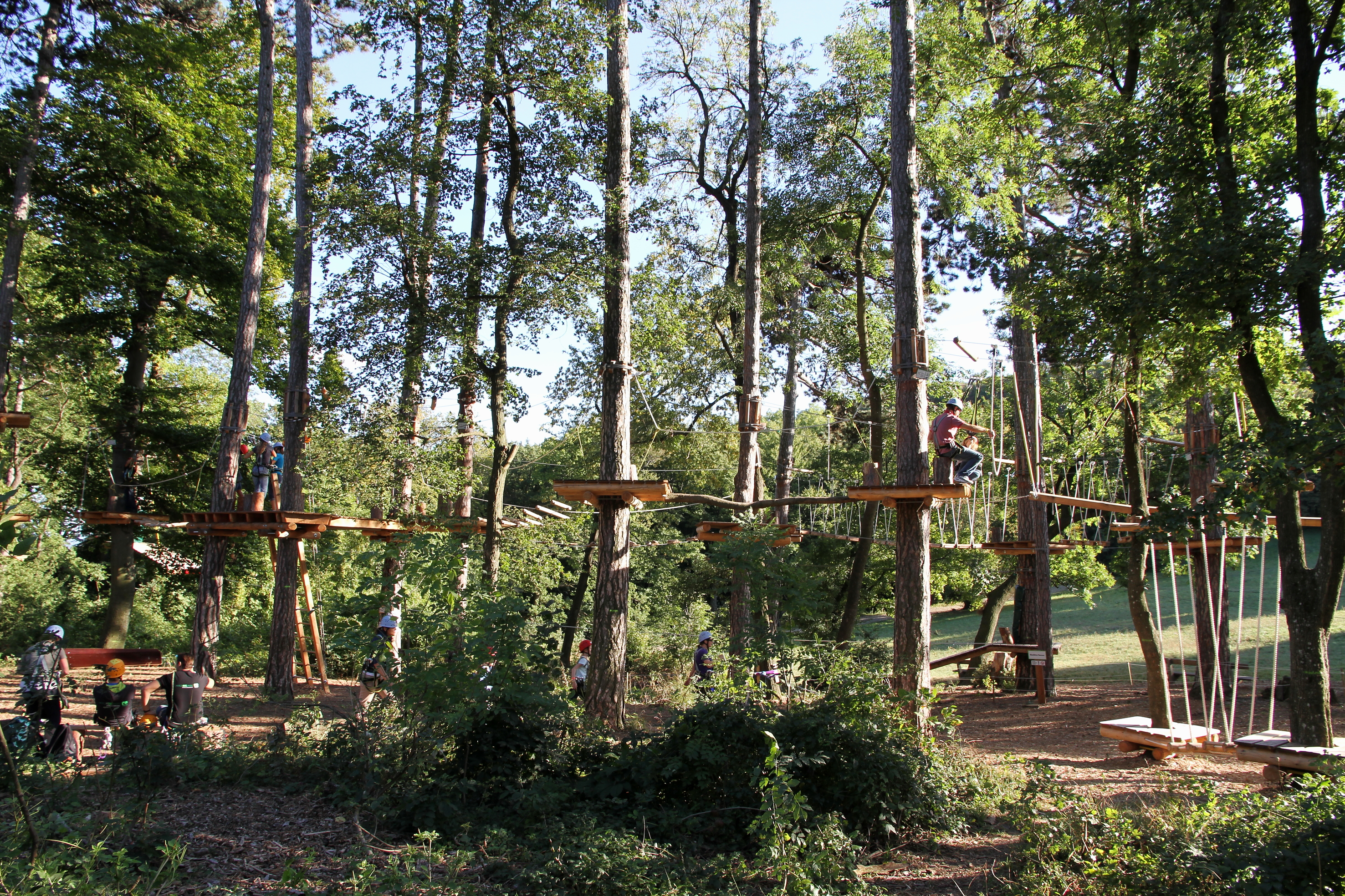 Der Kinder- bzw. Jugendlichenparcours des 2012 eröffneten Waldseilparkes Kahlenberg nächst der Josefinenhütte in Wien.